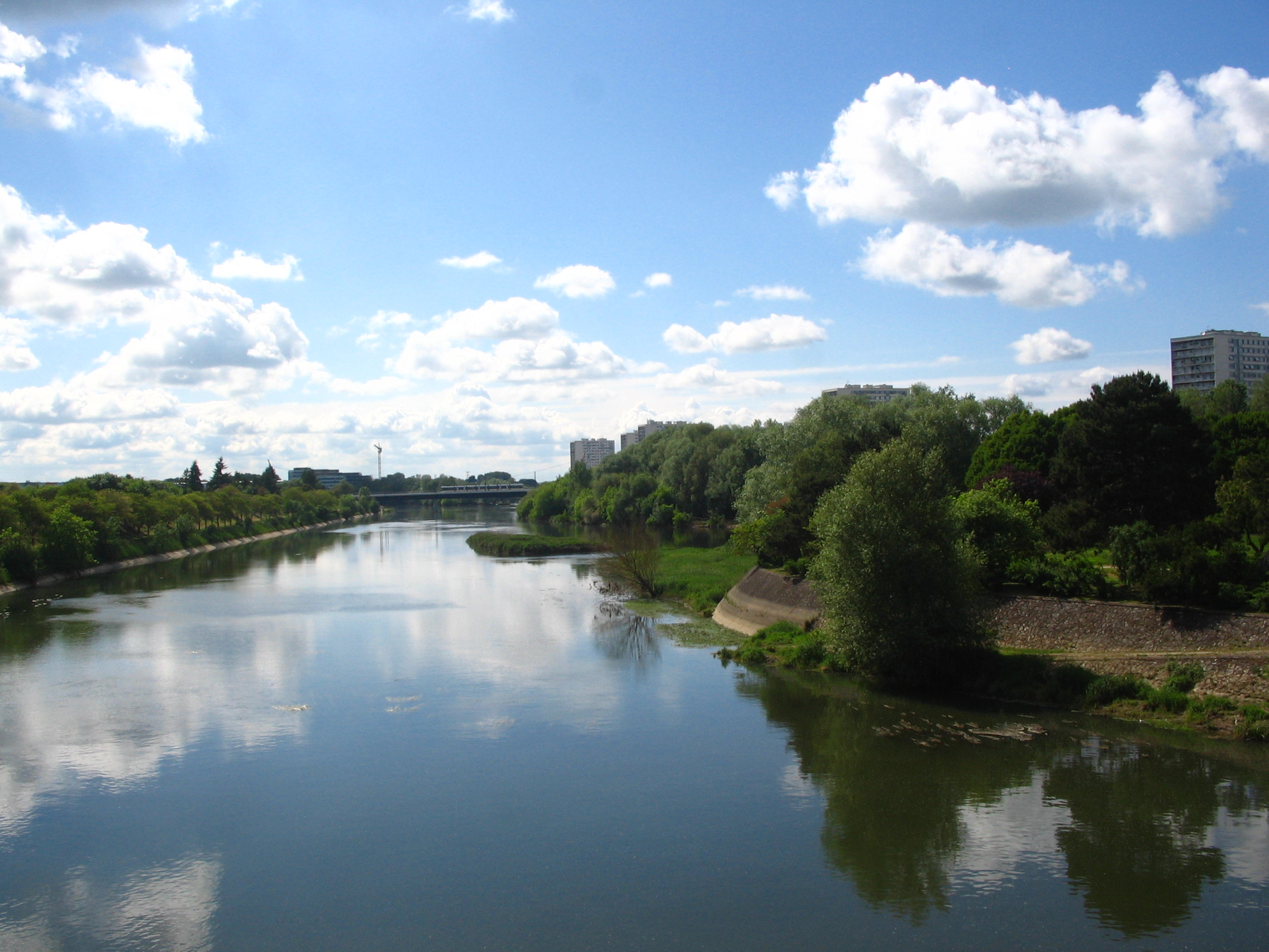 Le Cher à Tours (37).